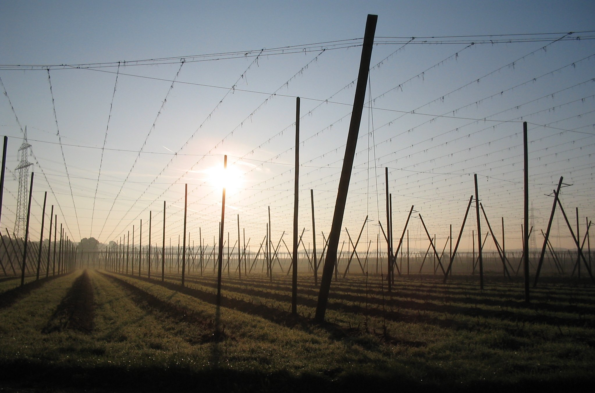 Sonnenaufgang über den abgeernteten Hopfengärten (Humulus lupulus) in der Hallertau. Aufgenommen östlich von Geisenfeld an der Bundesstraße 300.